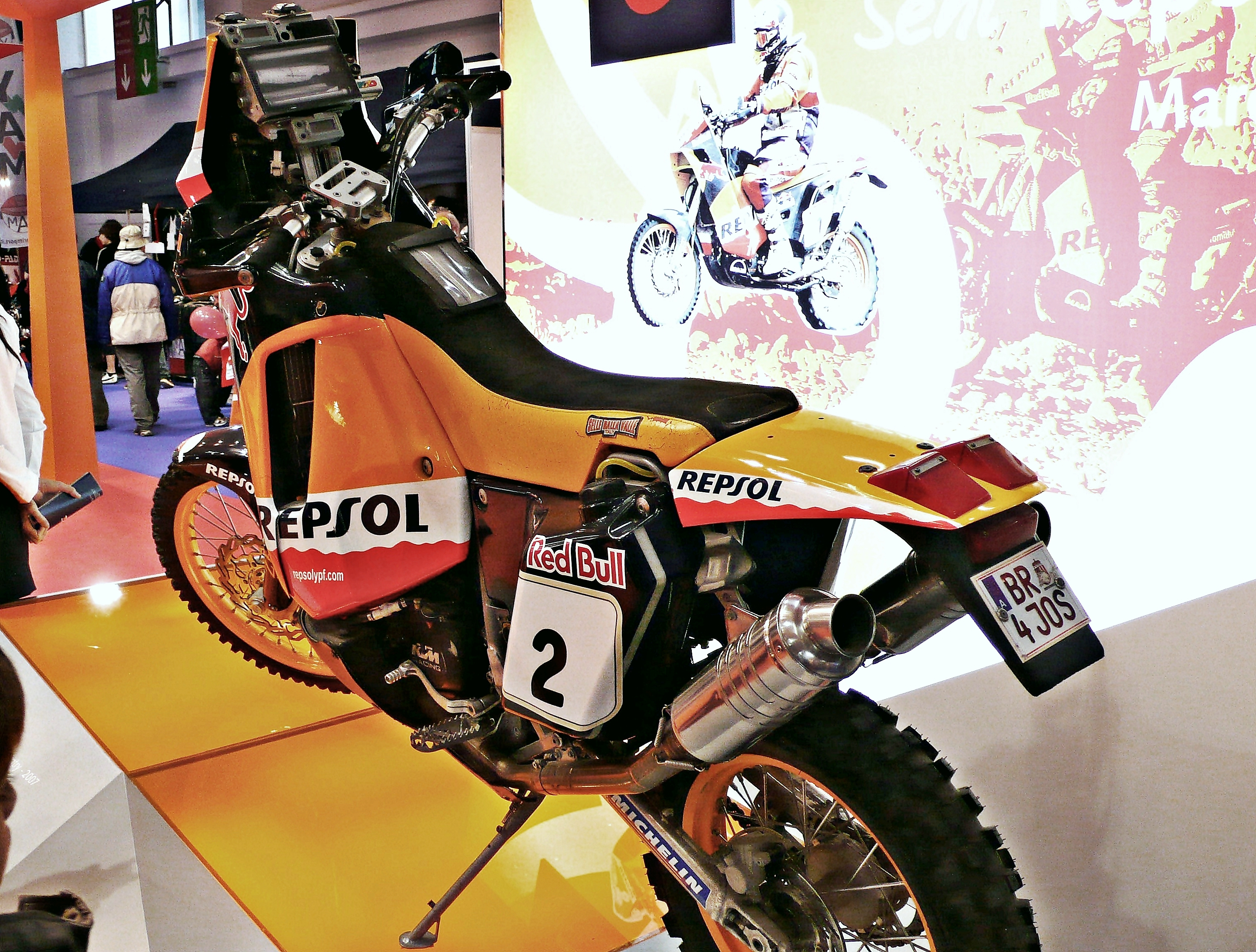 salon de barcelona-2006 rally dakar